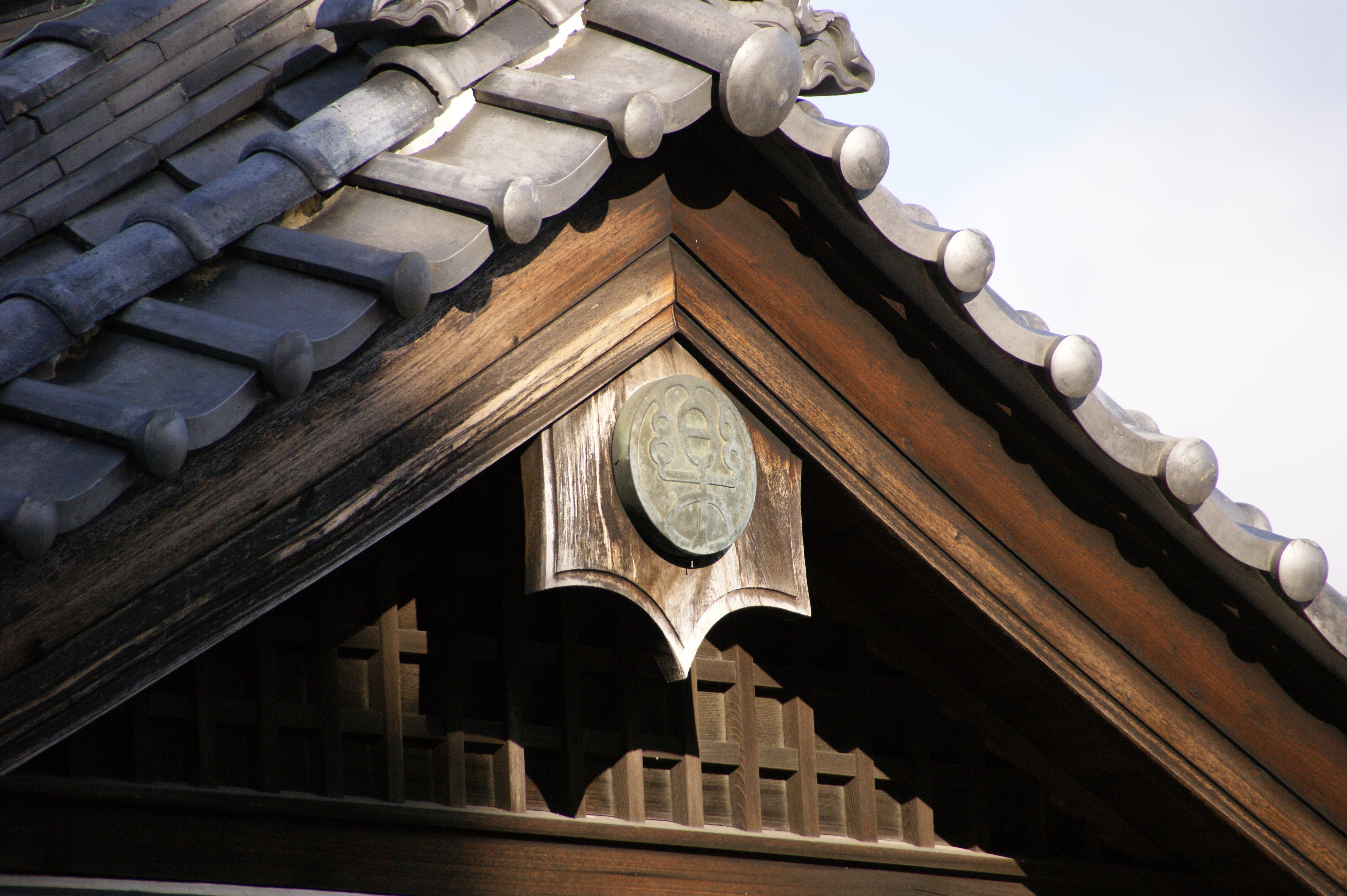 増田神社・伊勢大神楽講社の象徴『和楽』です。（和楽紋）